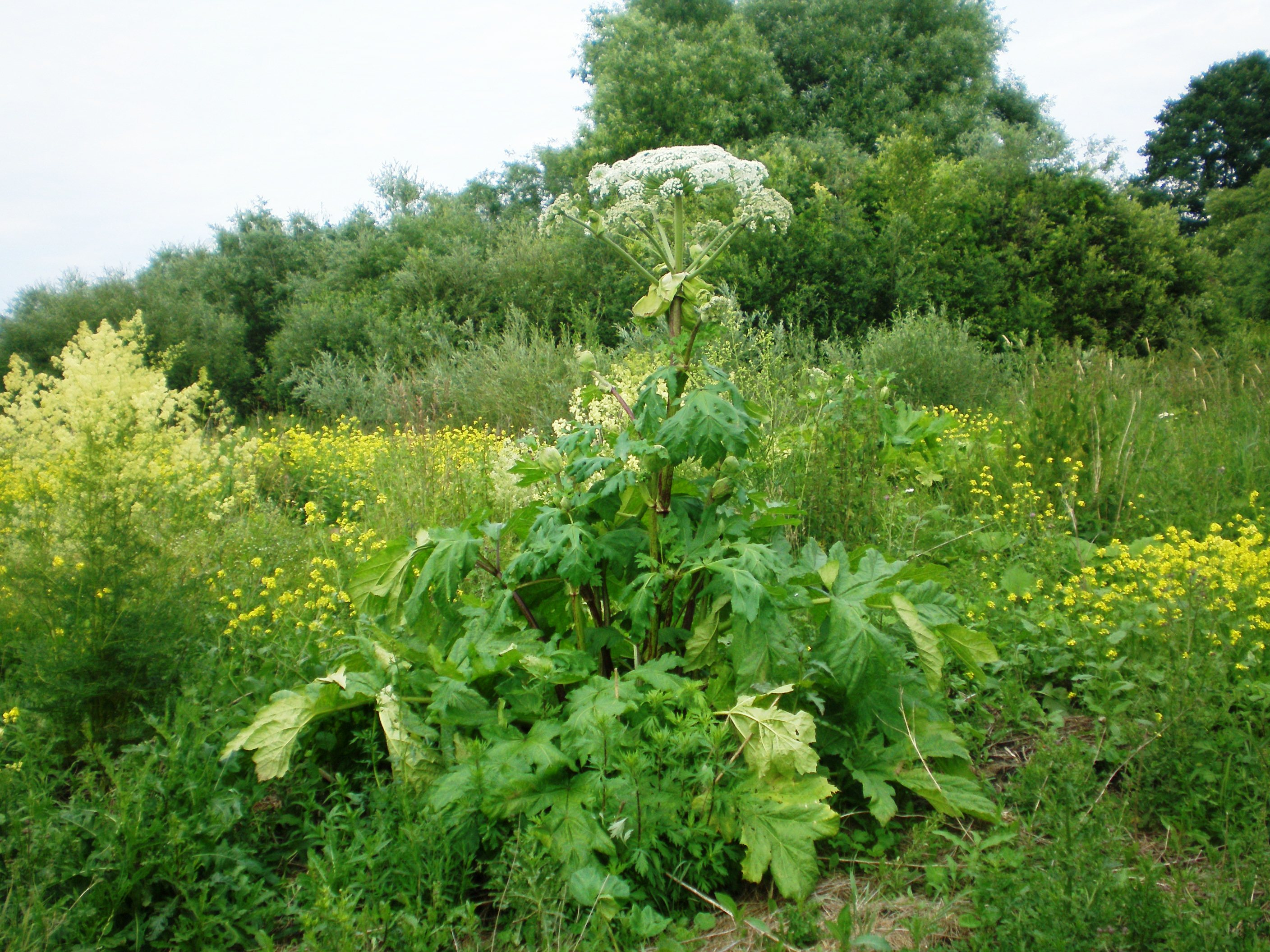 Heracleum sosnowskyi